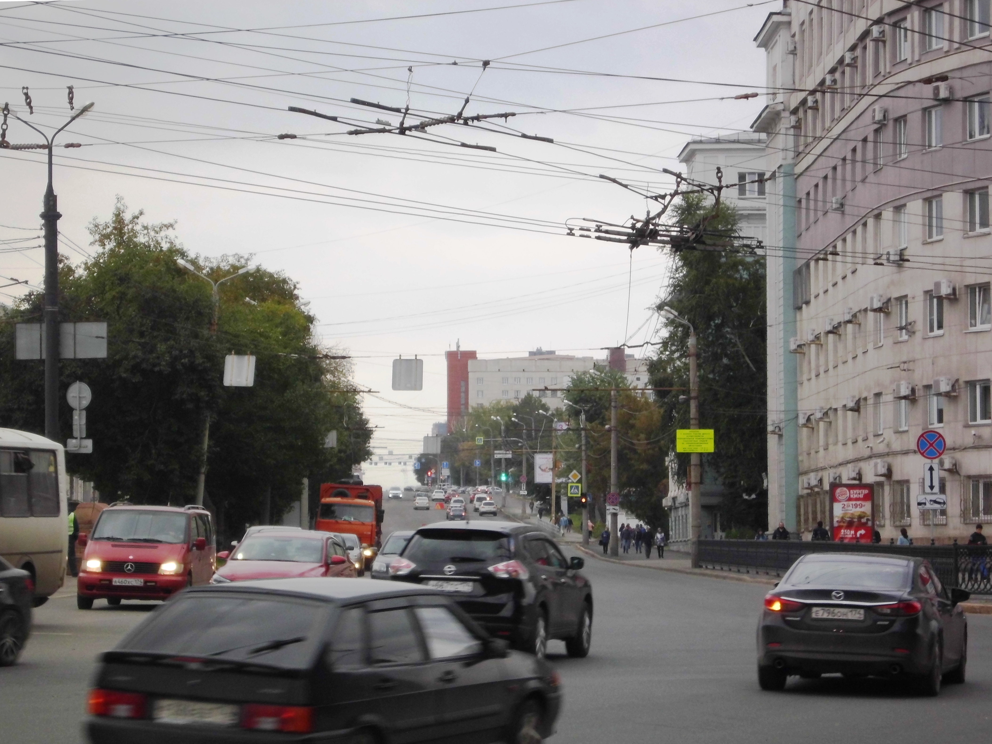 Гостиница (изначально по проекту предназначалась как гостиница, но более известно как здание арбитражного суда области, на фото справа): улица Воровского, 2 / проспект Ленина, 55 (с западной стороны площади Революции), Челябинск, Челябинская область. Вид с северо-восточного направления с пересечения пр-та Ленина (справа), ул. Кирова, ул. Воровского (начало, на фото посередине вдаль). Посередине снимка на дальнем плане - корпуса городской клинической больницы № 1.